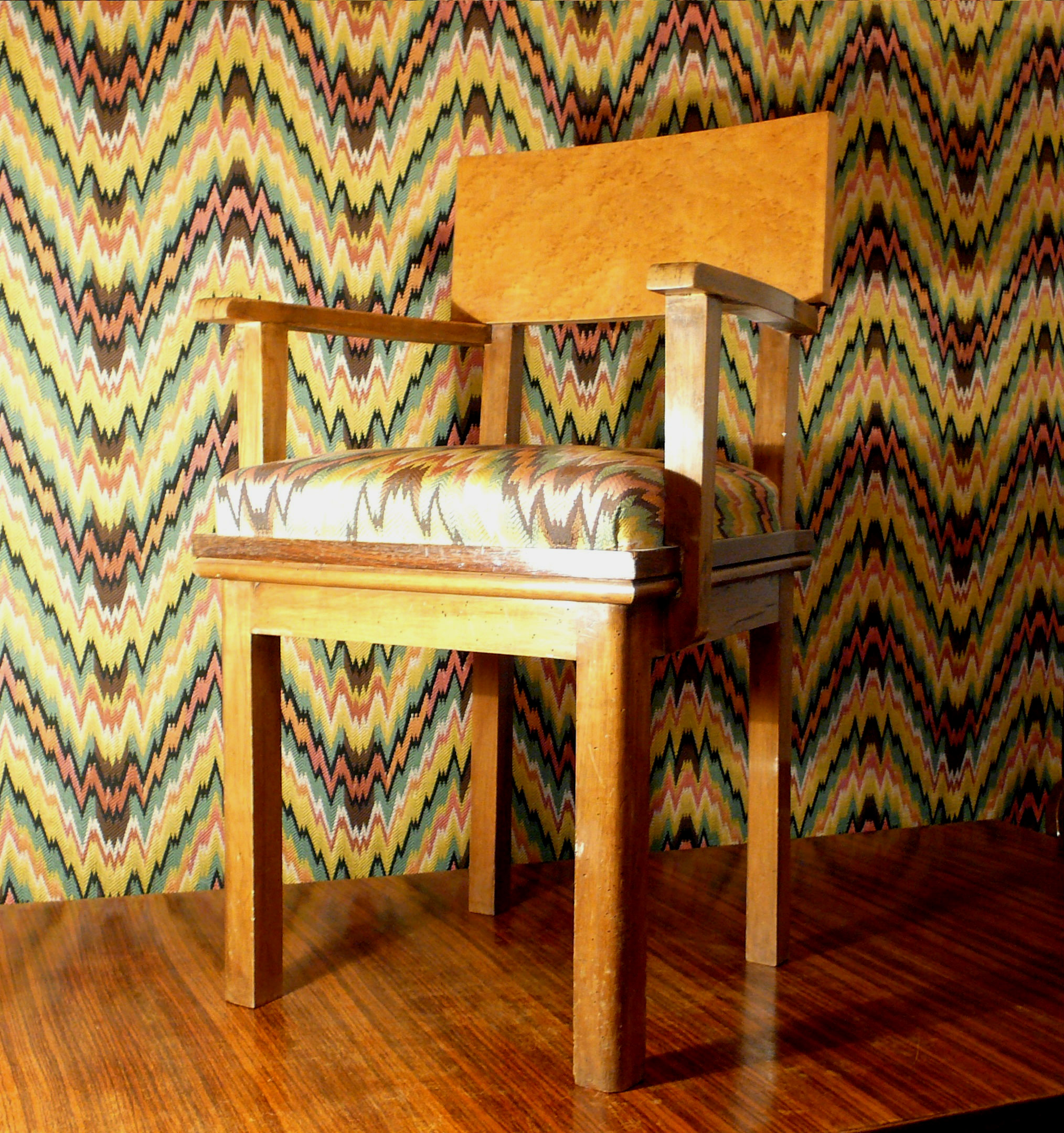 Arnaldo Dell'Ira (1903-1943). Sedia stile '900, 1938. Livorno, collezione privata.